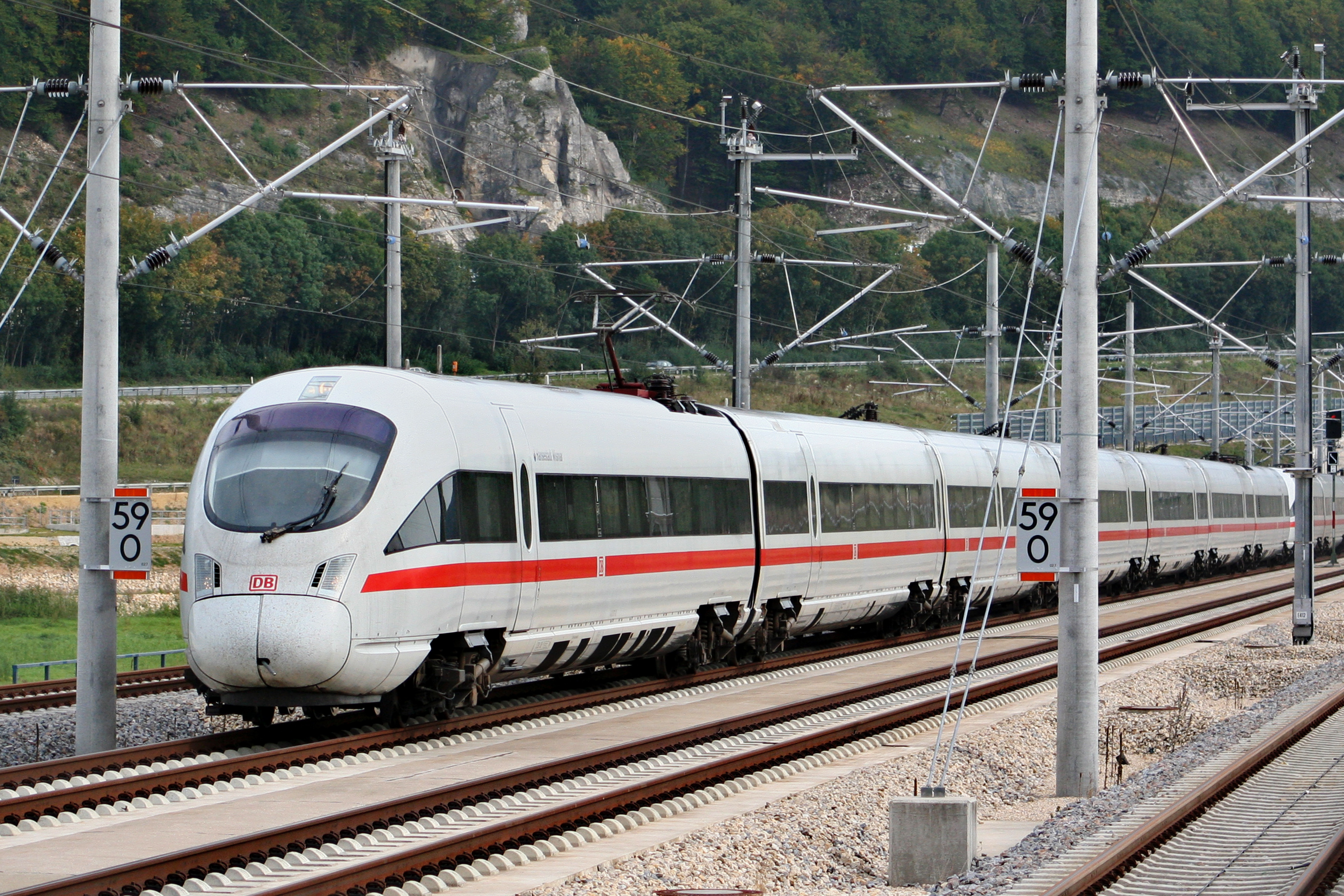 Eine Doppeltraktion ICE-T im Bahnhof von Kinding